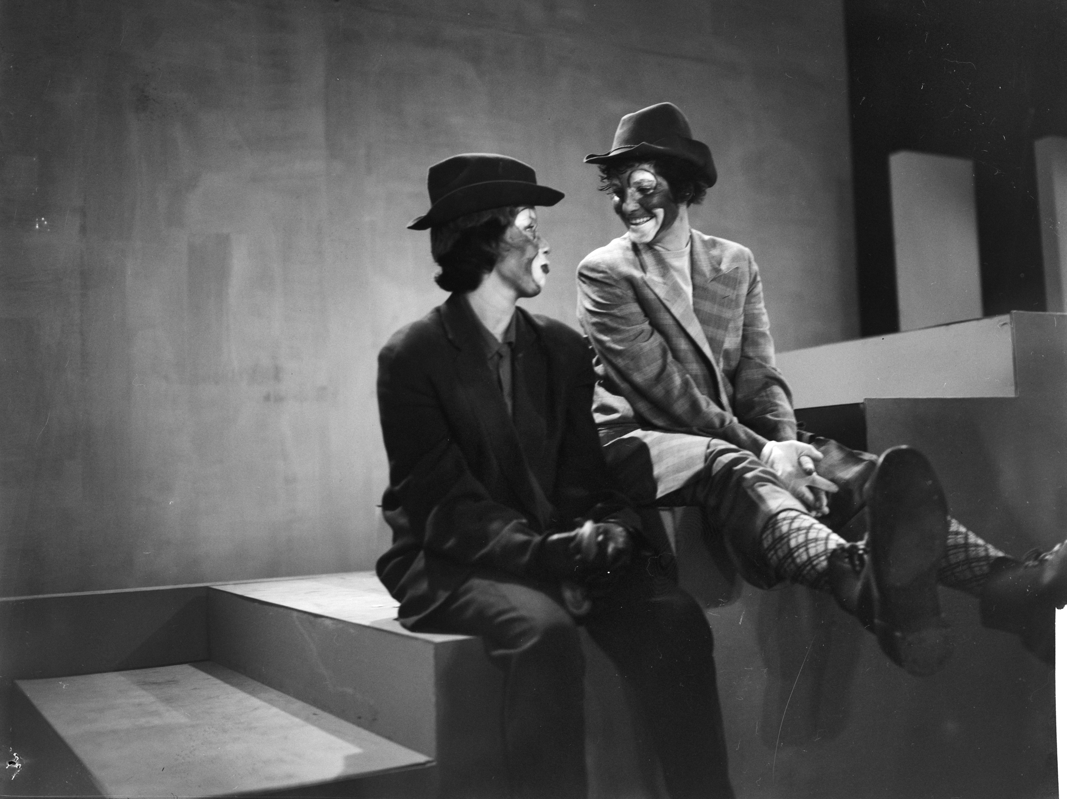 Televisieprogramma "In de hoofdrol", Corry Brokken en Mies Bouwman als clowns. Datum 29 oktober 1960